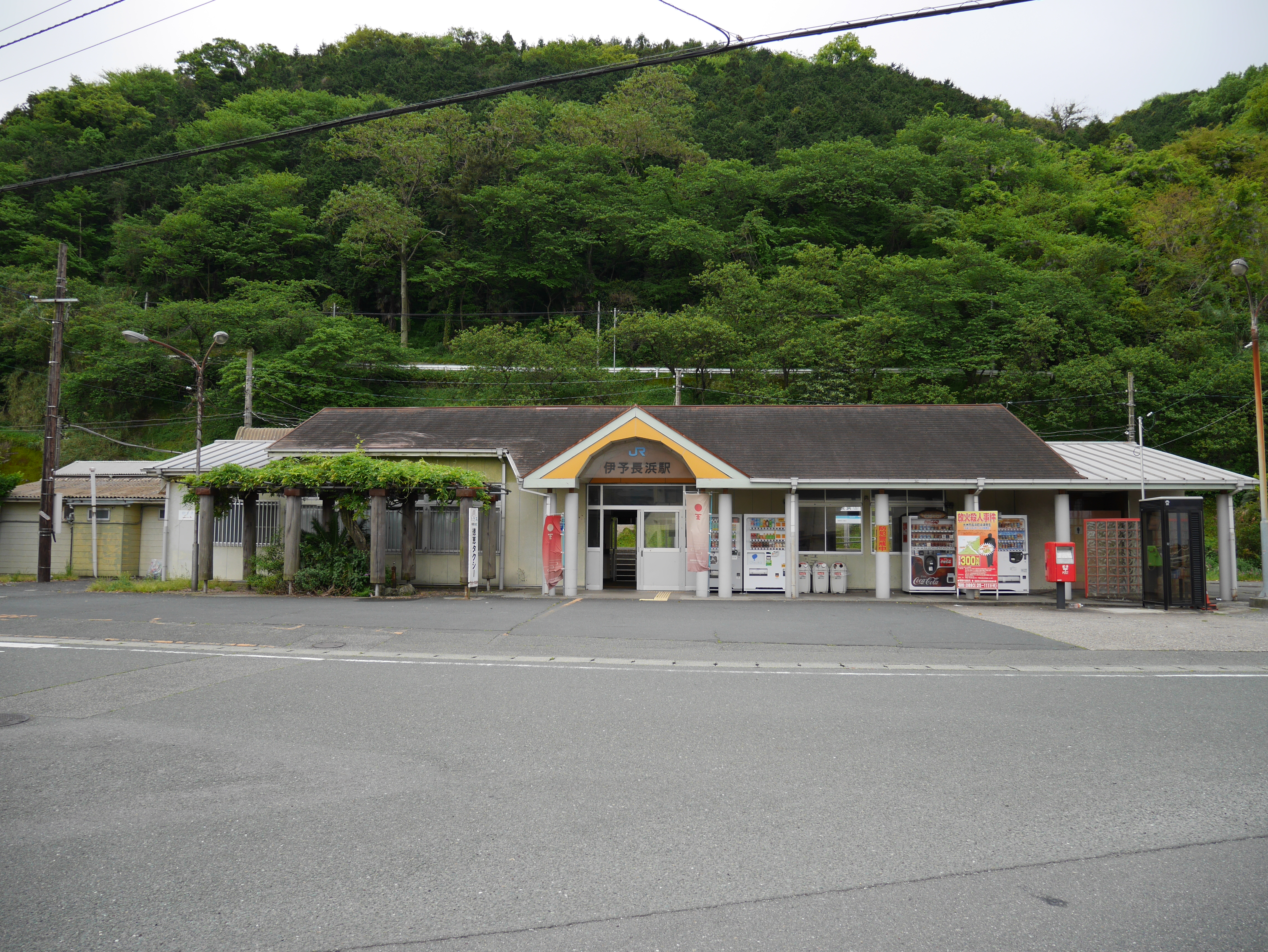 伊予長浜駅駅舎。2015年5月時点。